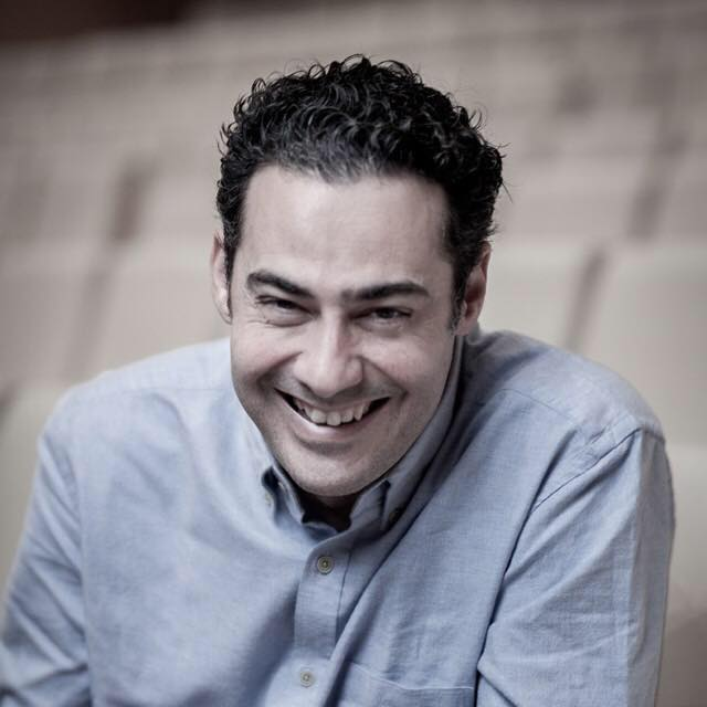 Pedro Vázquez Marín